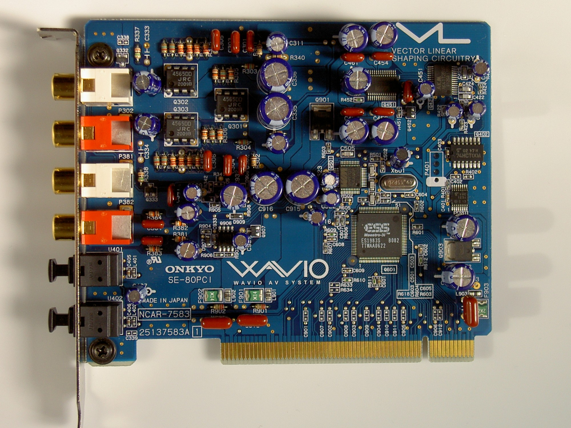 ONKYO SE-80PCI Audio Board